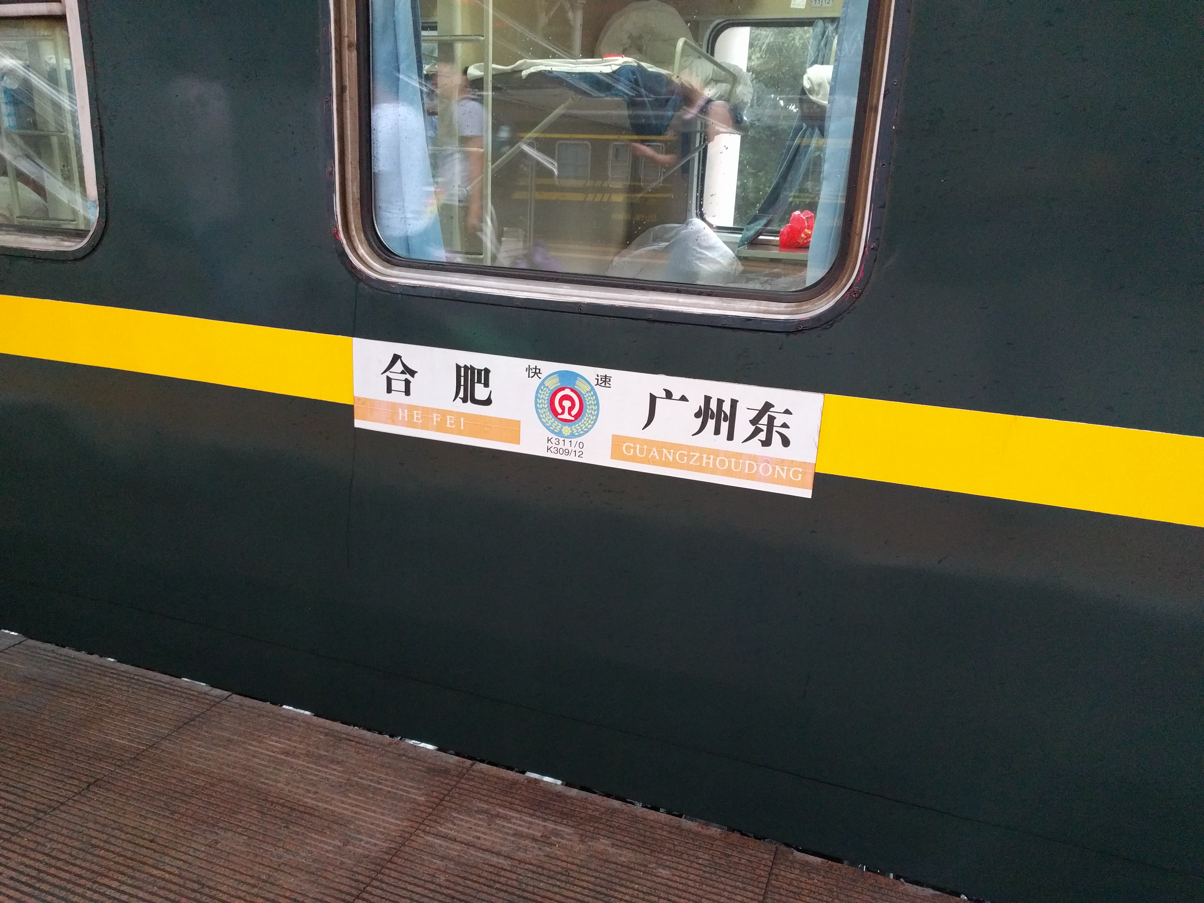 合肥站合肥站